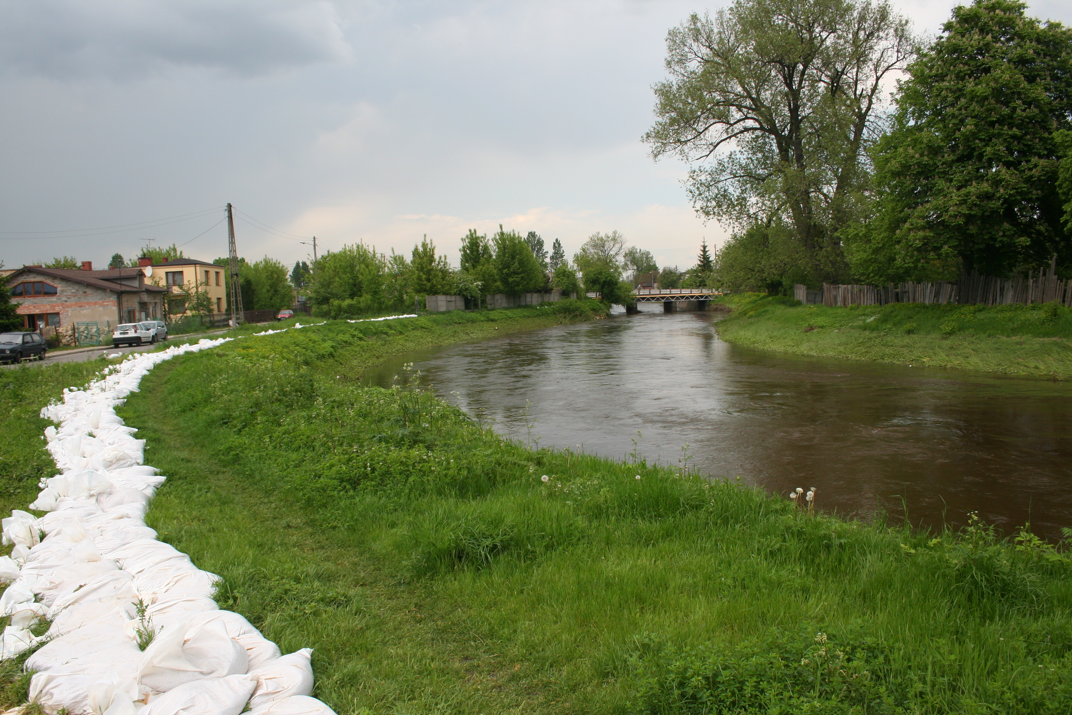 Warta w okolicach Starego Miasta w Częstochowie po powodzi w 2010.